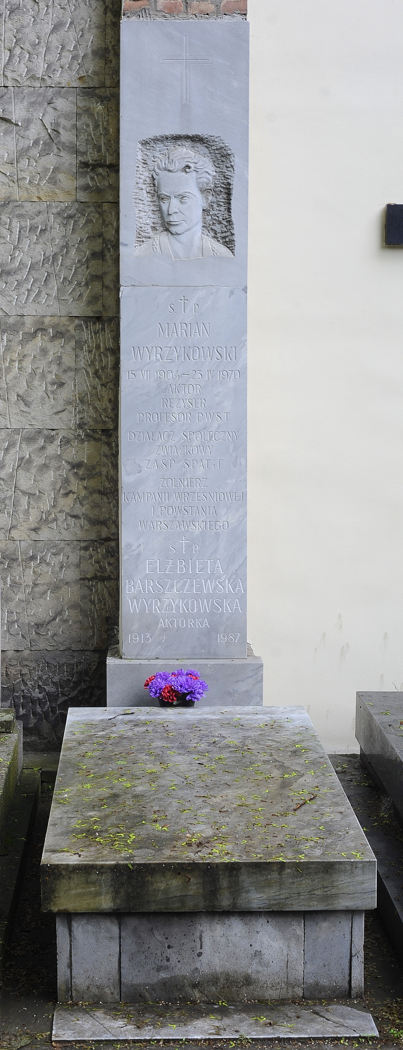 Grób aktorów Elżbiety Barszczewskiej i Mariana Wyrzykowskiego na warszawskim Cmentarzu Powązkowskim.